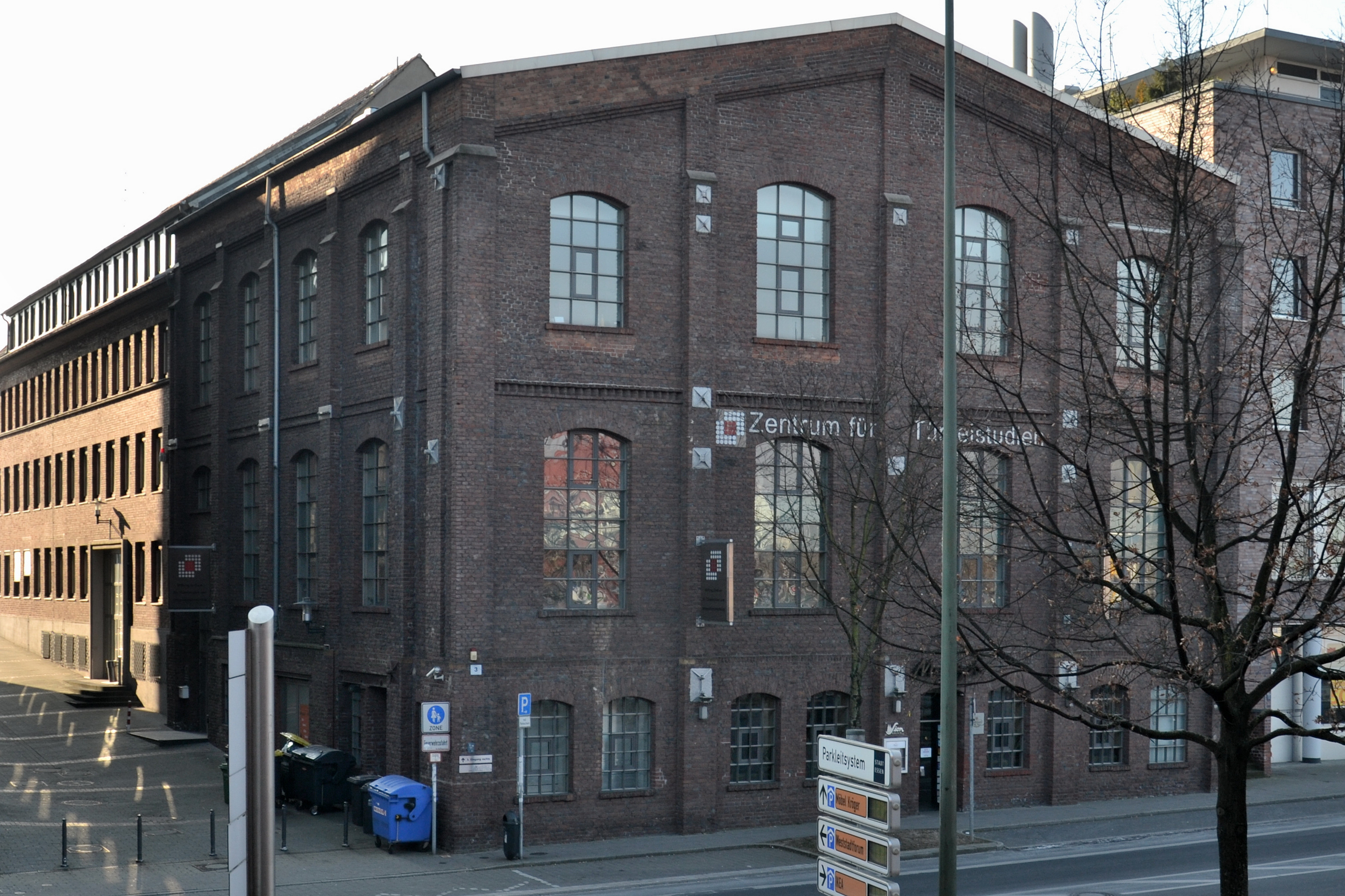 Ehem. Geschossdreherei der Fa. Krupp in Essen, einzig verbliebenes Werksgebäude, das schon zu Lebzeiten Alfred Krupps existierte